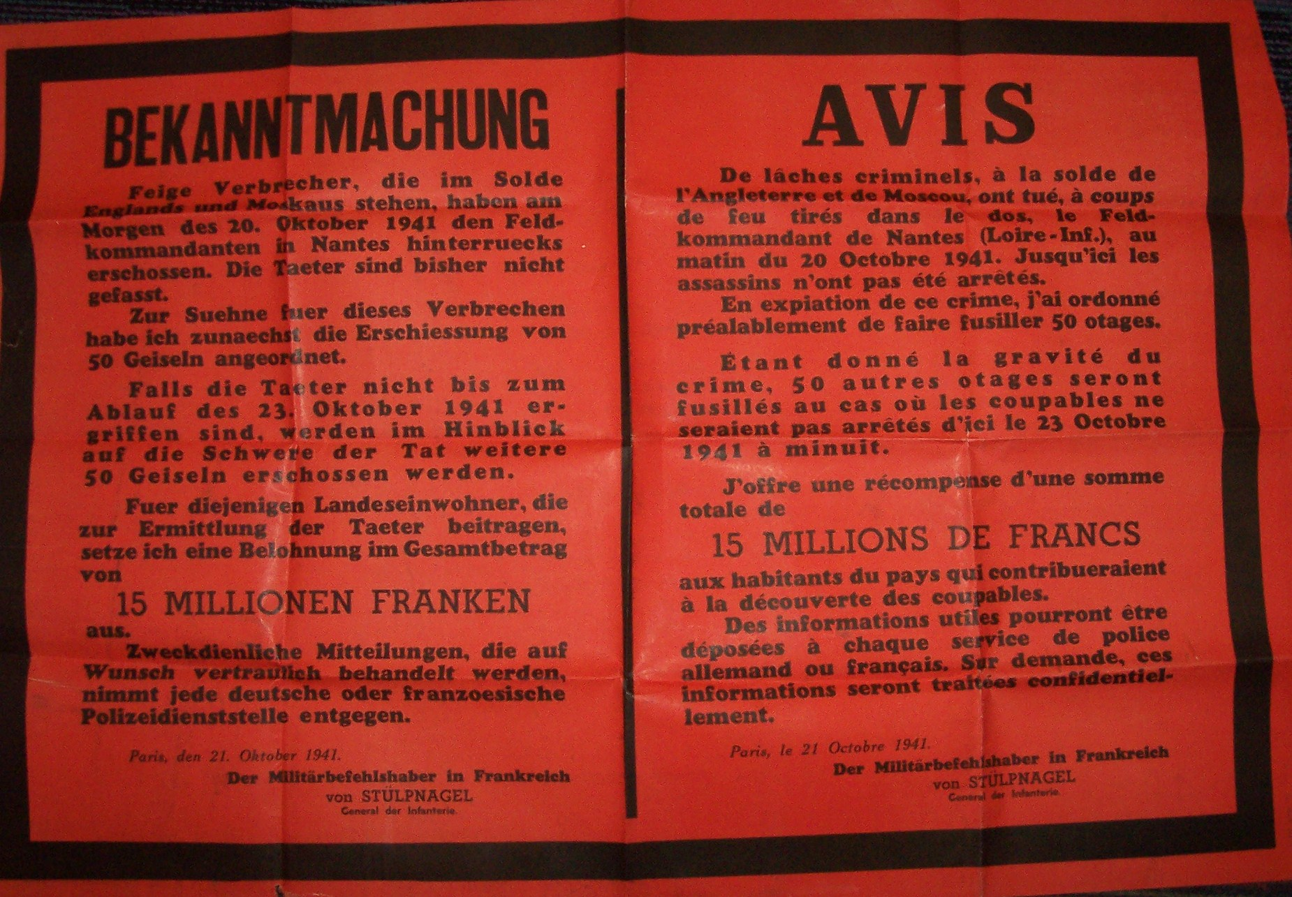 Affiche de recherche des auteurs de l'attentat de Nantes du 20 octobre 1941 contre le Commandant Hotz, trouvée aux archives départementales des Yvelines à la côte 300W 46